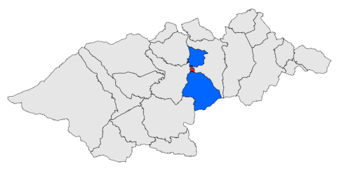 Mapa de l'antiga comuna dels Banys d'Arles, feta a partir d'un mapa de lliure disposició